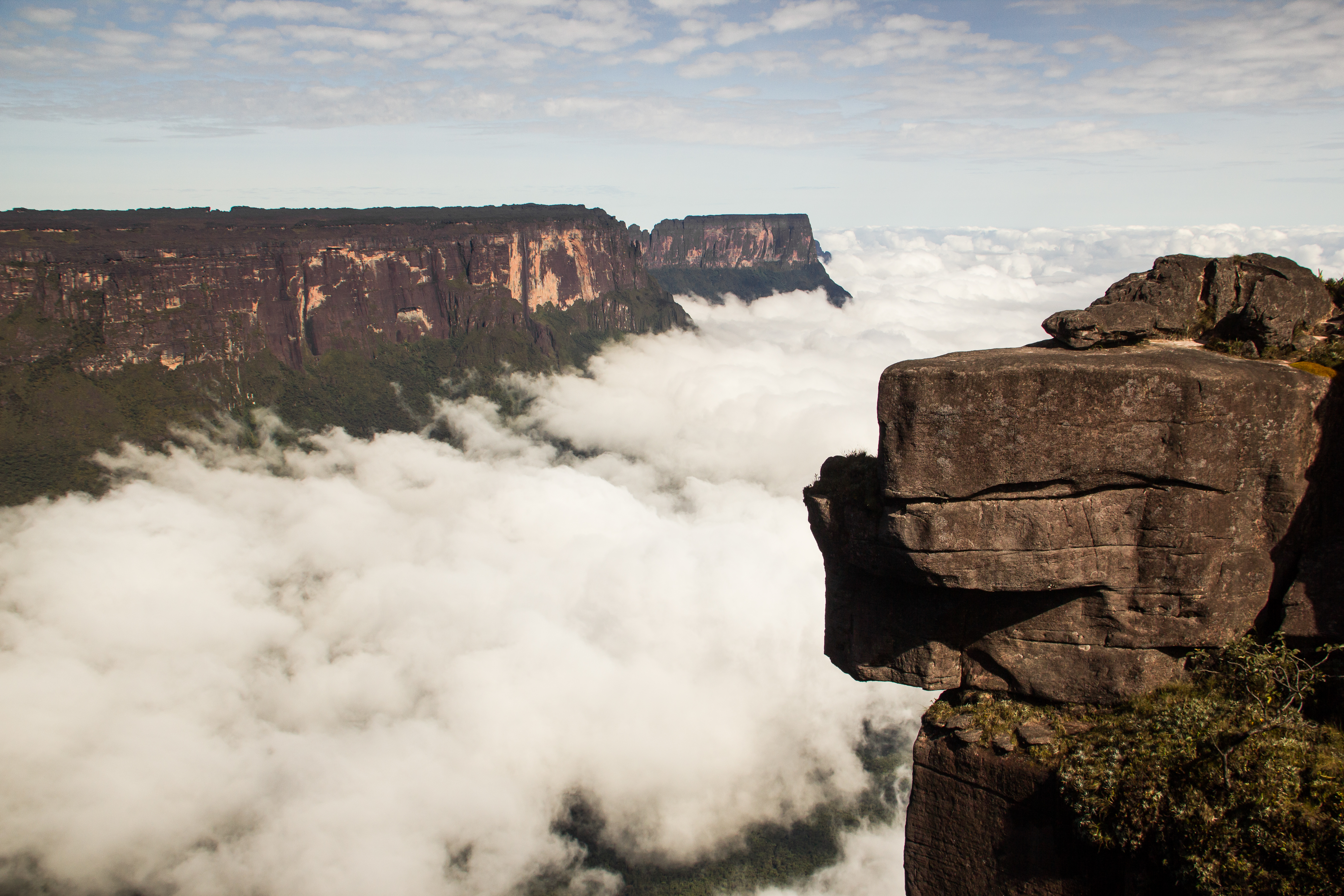 Vista do Monte Kukenan do topo do Monte Roraima